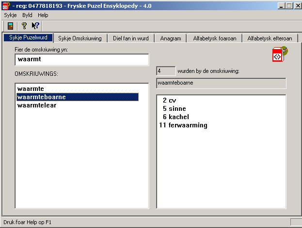 FryskePuzelEnsyklopedy, rjochten frijjûn op sneon 1 novimber 2008 17.45 oere